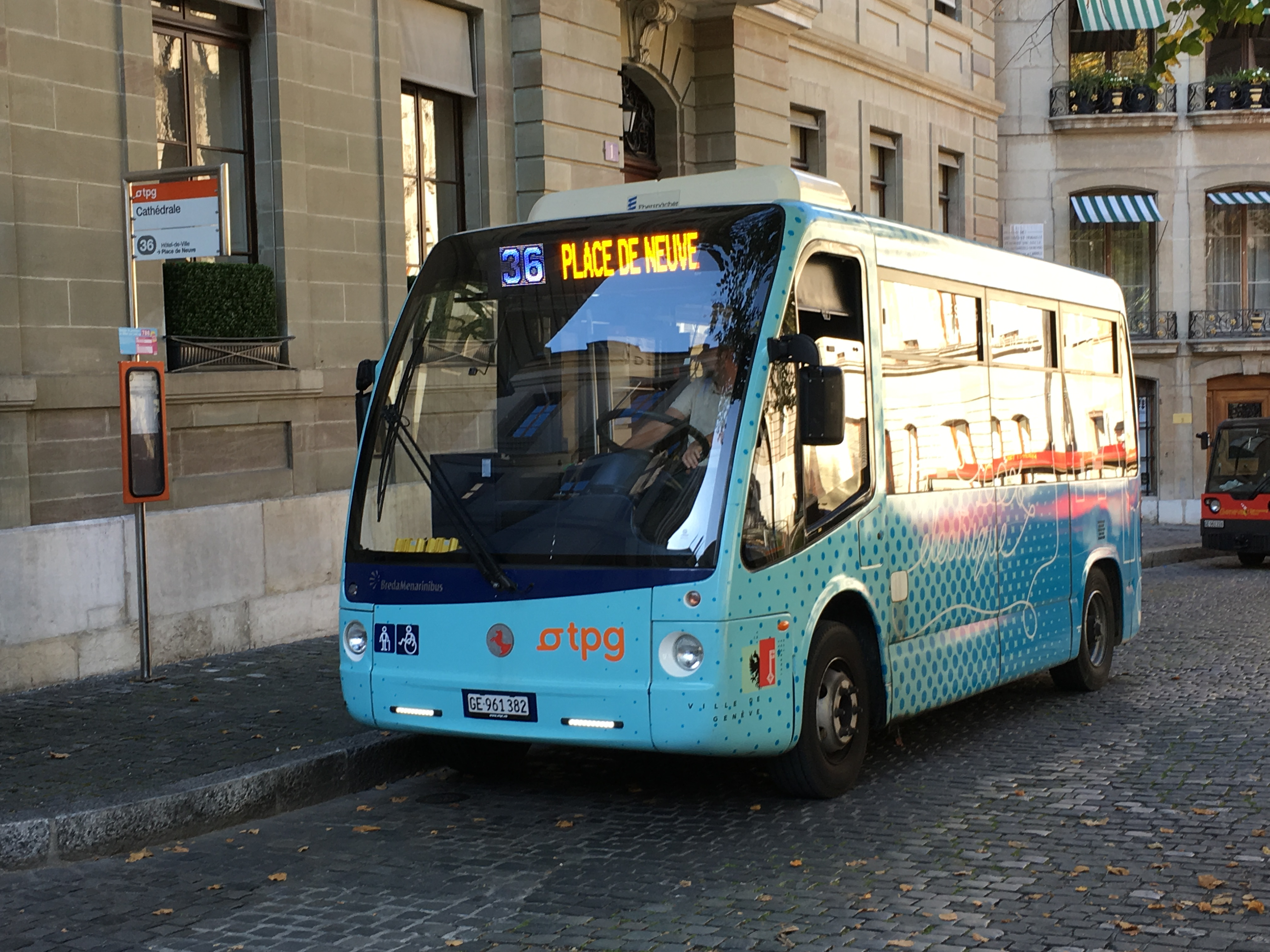 BredaMenarinibus Zeus sur la ligne 36 des Transports publics genevois, cour de St-Pierre.